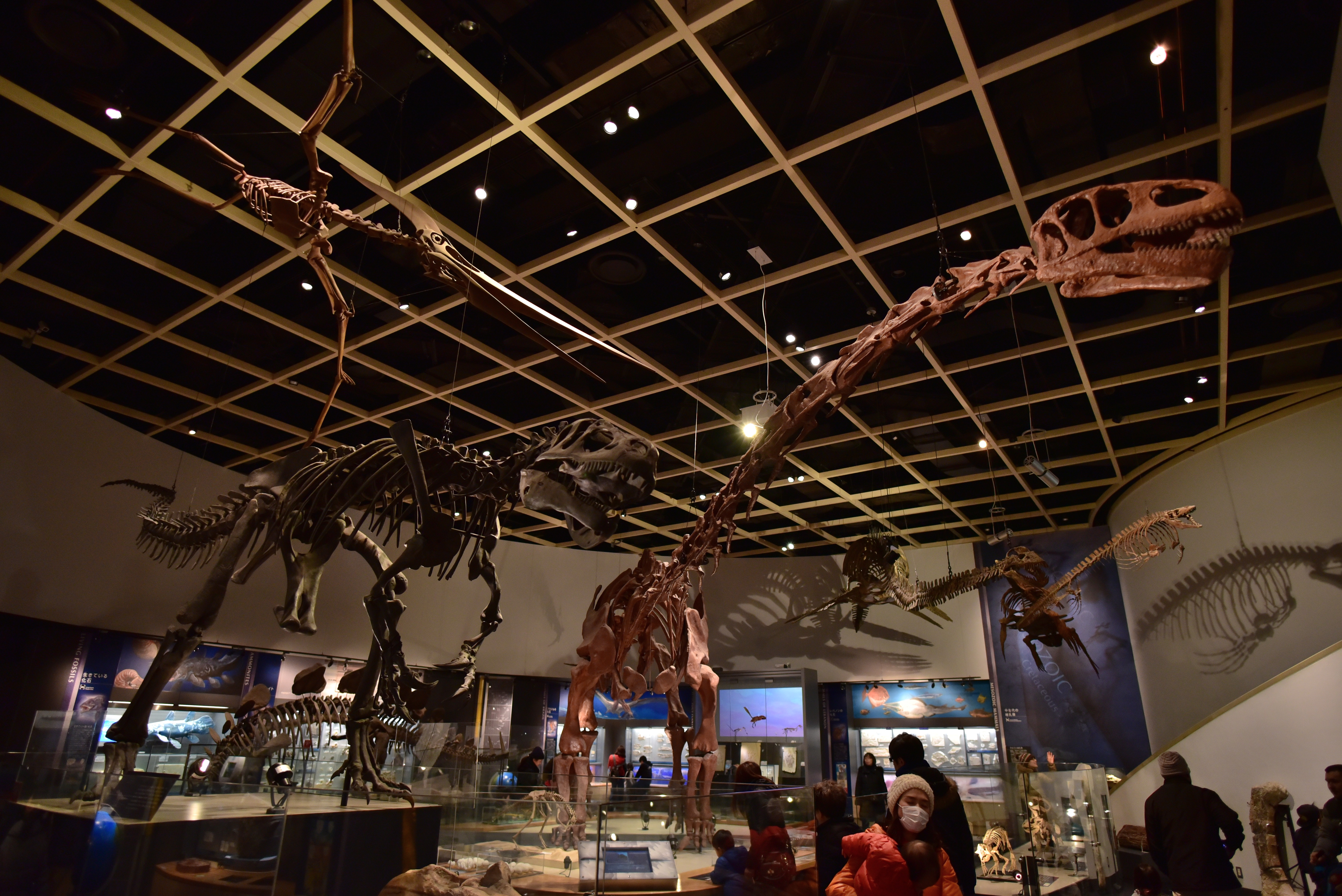 自然史博物館の恐竜骨格の展示